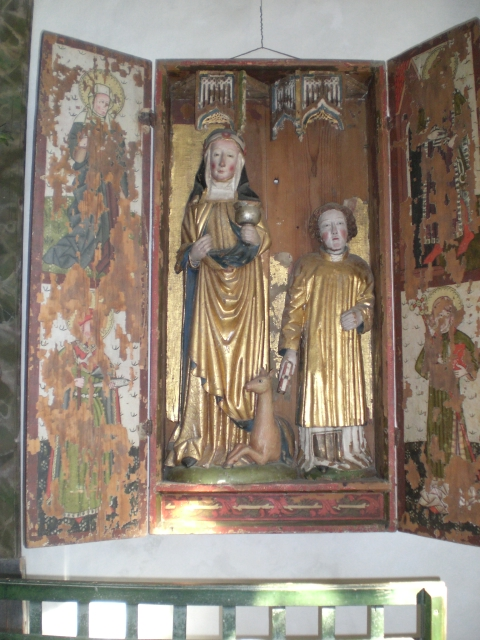 Helgonaskåpet i Trönö gamla kyrka förställande Katarina av Vadstena och S:t Laurentinus (Santa Lars)gjord av Haakan Gullesson från i början av 1500-talet.